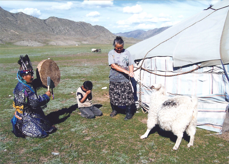 Шаманский обряд приношения жертвы духам